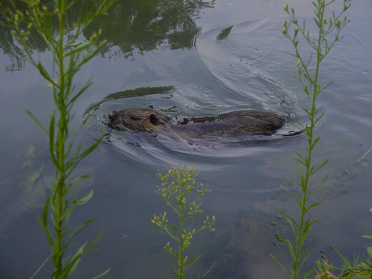 Un ragondin dans la boucle de la Marne, à Saint-Maur-des Fossés.